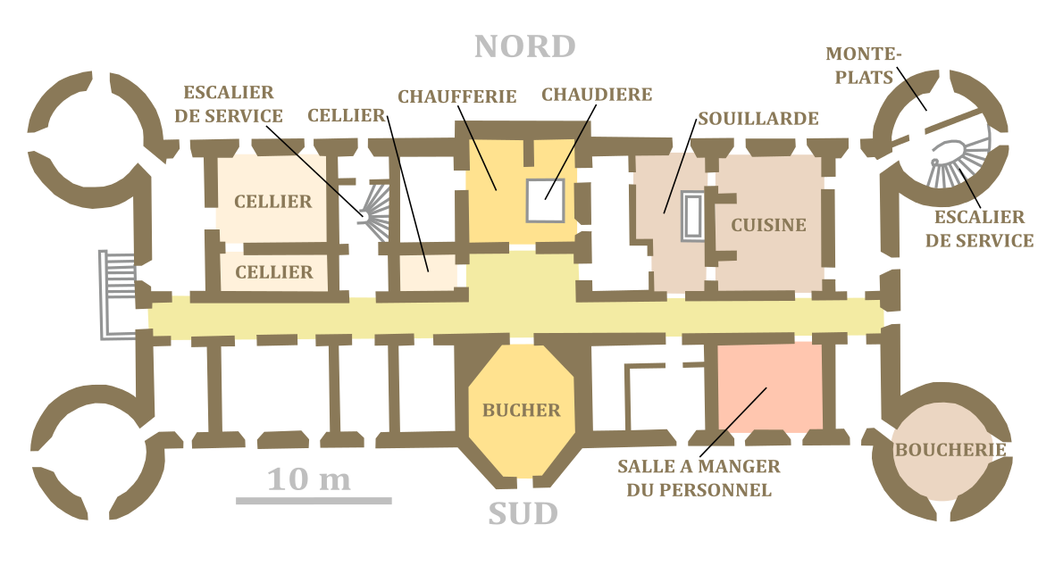 Plan du sous-sol du château de Challain, Maine-et-Loire, France.